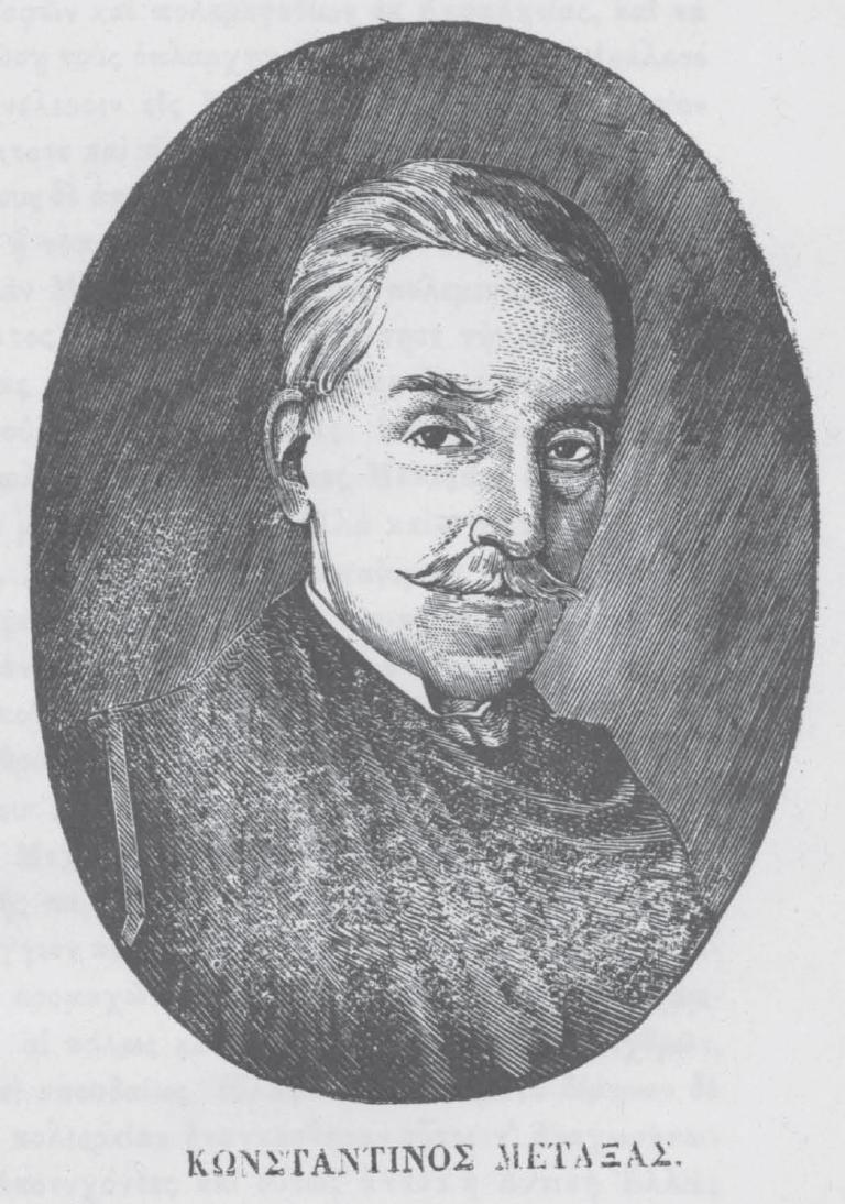 Griechischer Gelehrter, 19. Jahrhundert